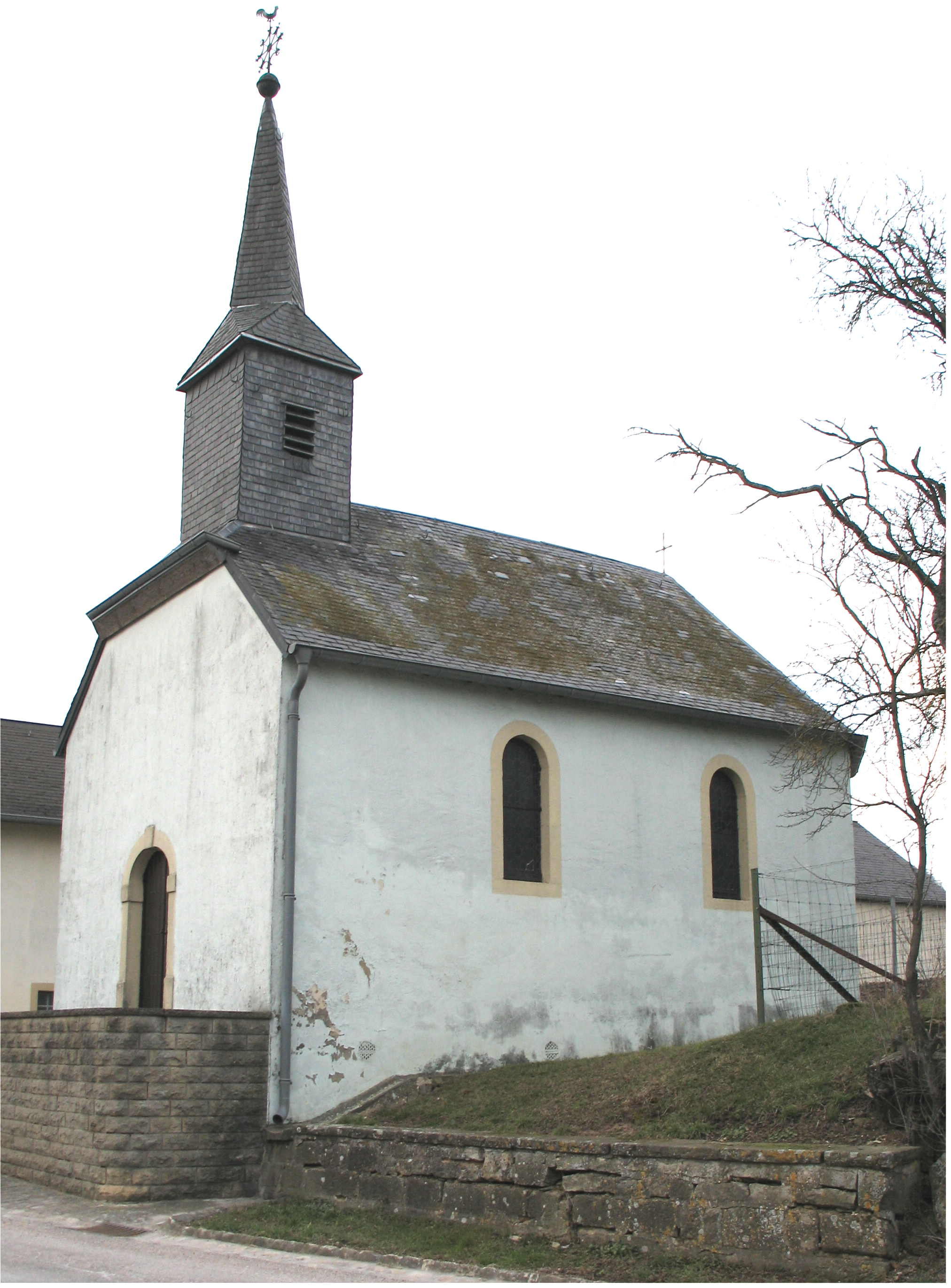 Sujet : Kapell zu ZÃ«tteg Source : Eege Foto Johnny Chicago (MÃ¤erz 2006) Lizenz